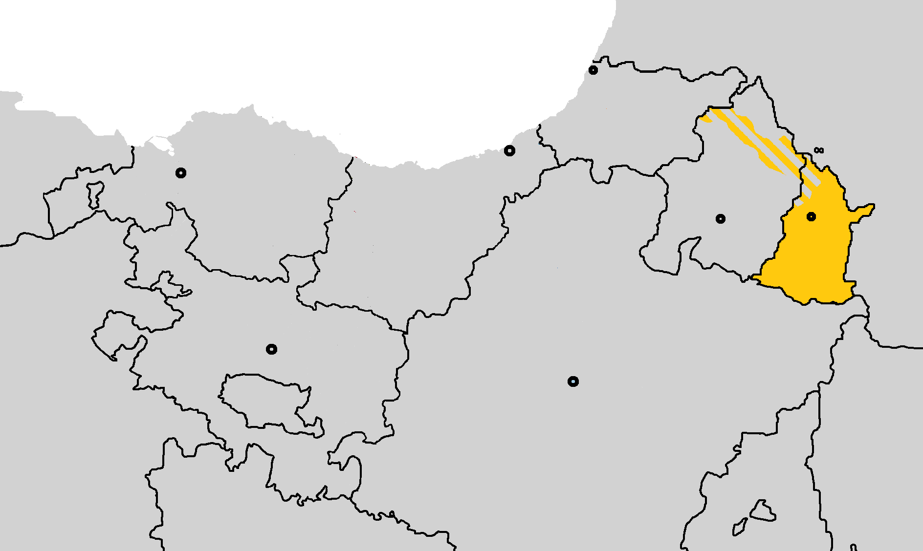 Dialecto sulentino del euskera.